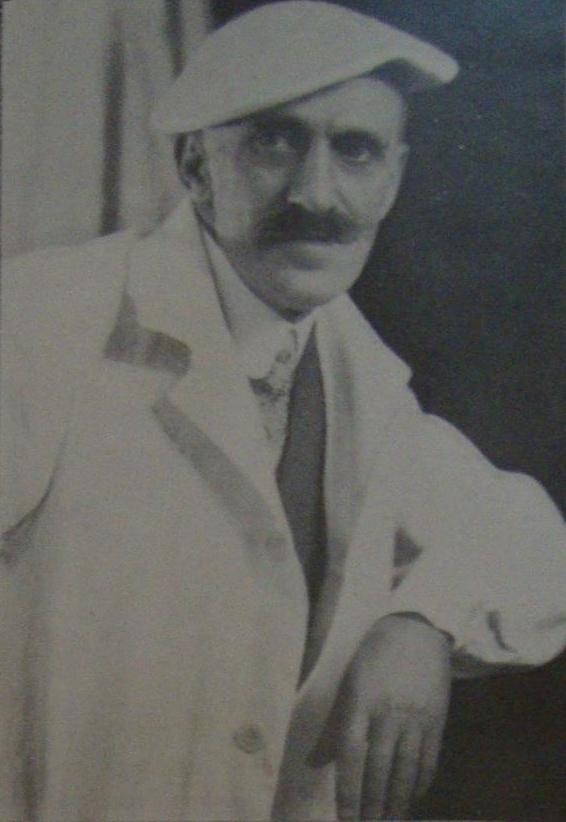 Eduardo Le Monnier (Edouard Le Monnier) arquitecto francés que realizó la mayor parte de sus obras en la ciudad de Buenos Aires. Nació en 1873 y falleció en 1931.